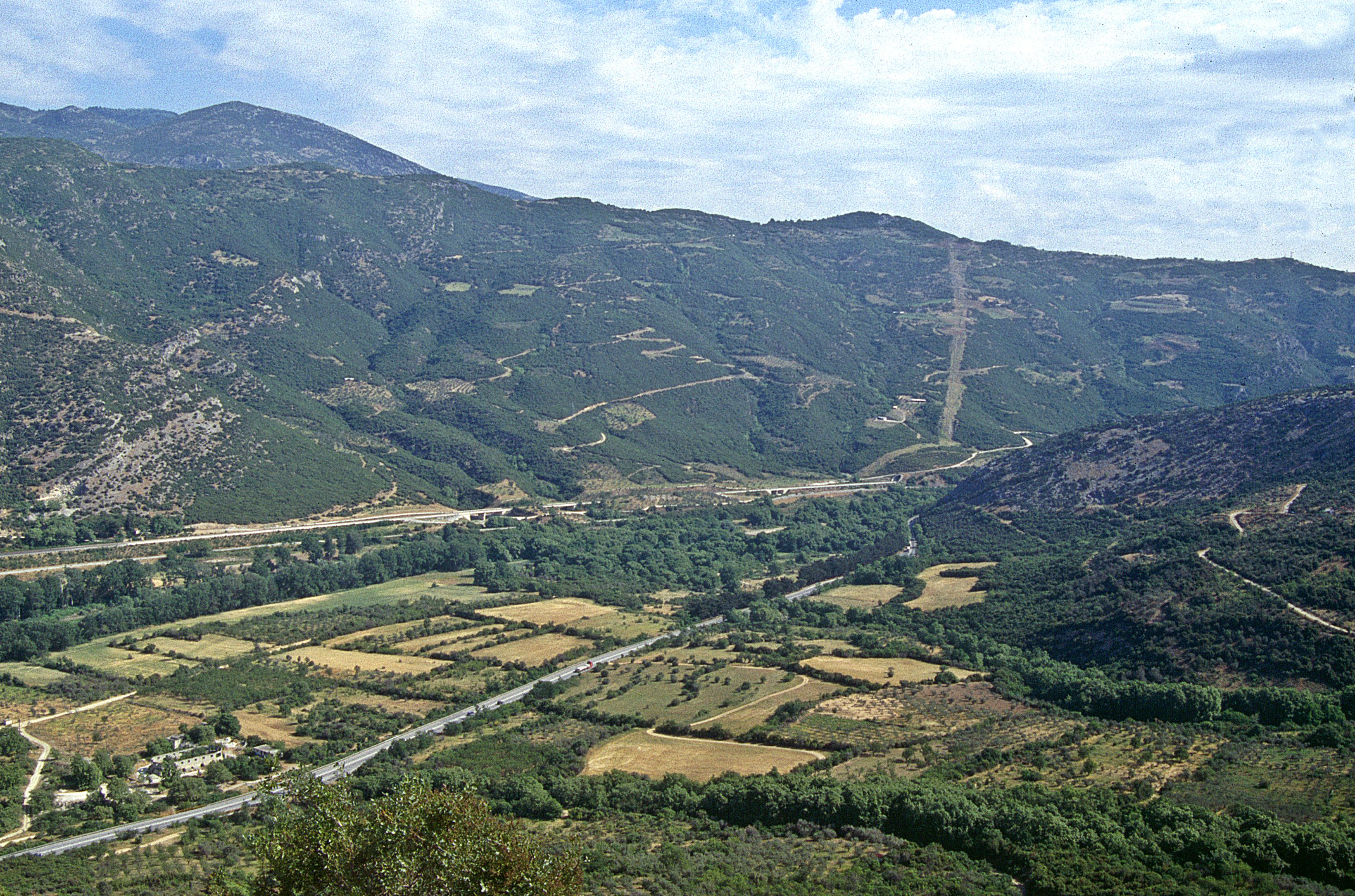 Tempe-Tal